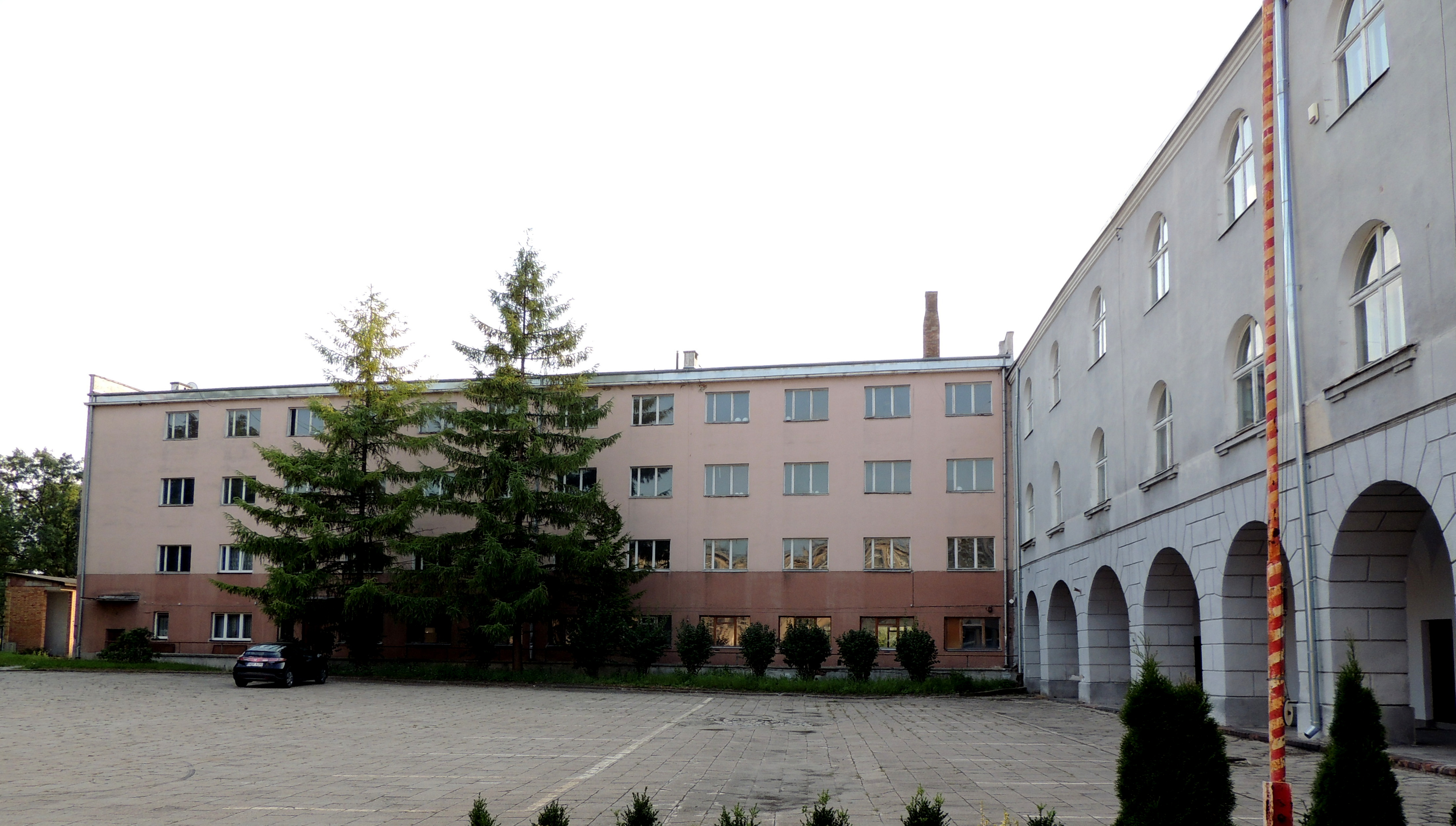 Braniewo, gimnazjum jezuickie (Liceum Hosianum), 1743-1771